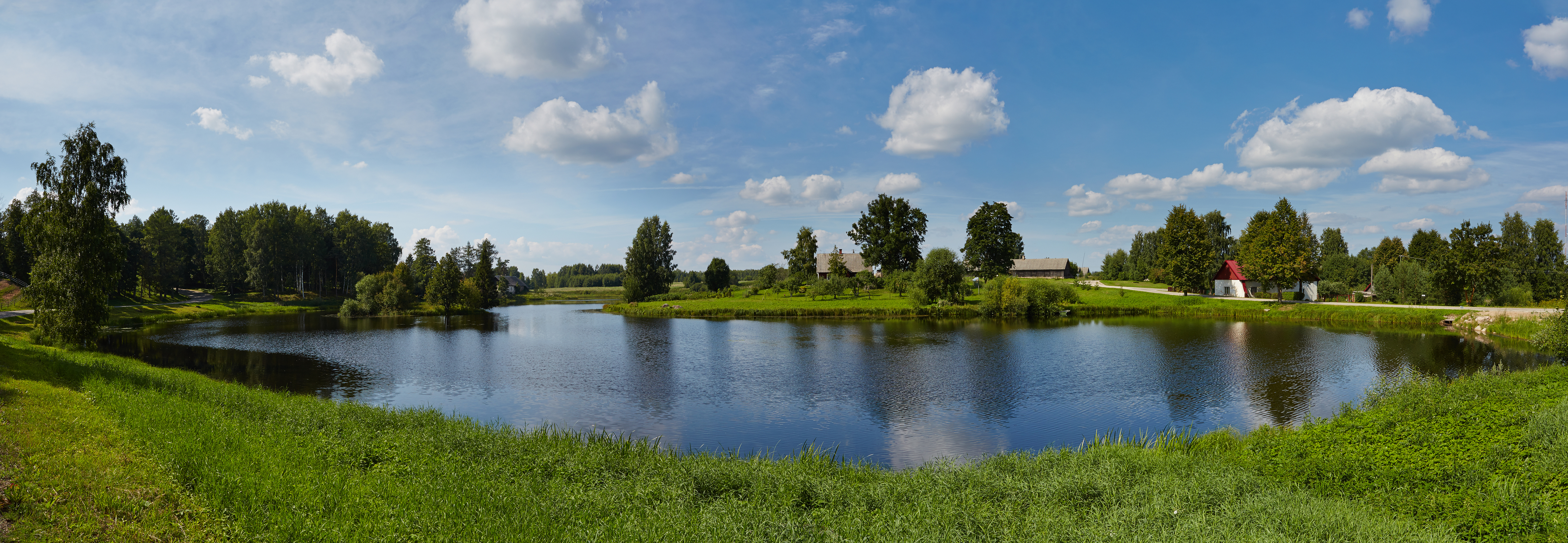 Tsooru järv Antsla vallas